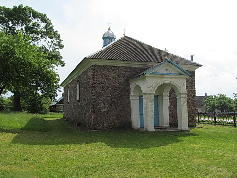 Падгорная. Свята-Антоніеўская царква са званіцай